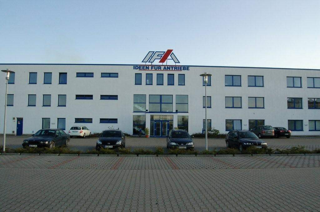 IFA Haldensleben